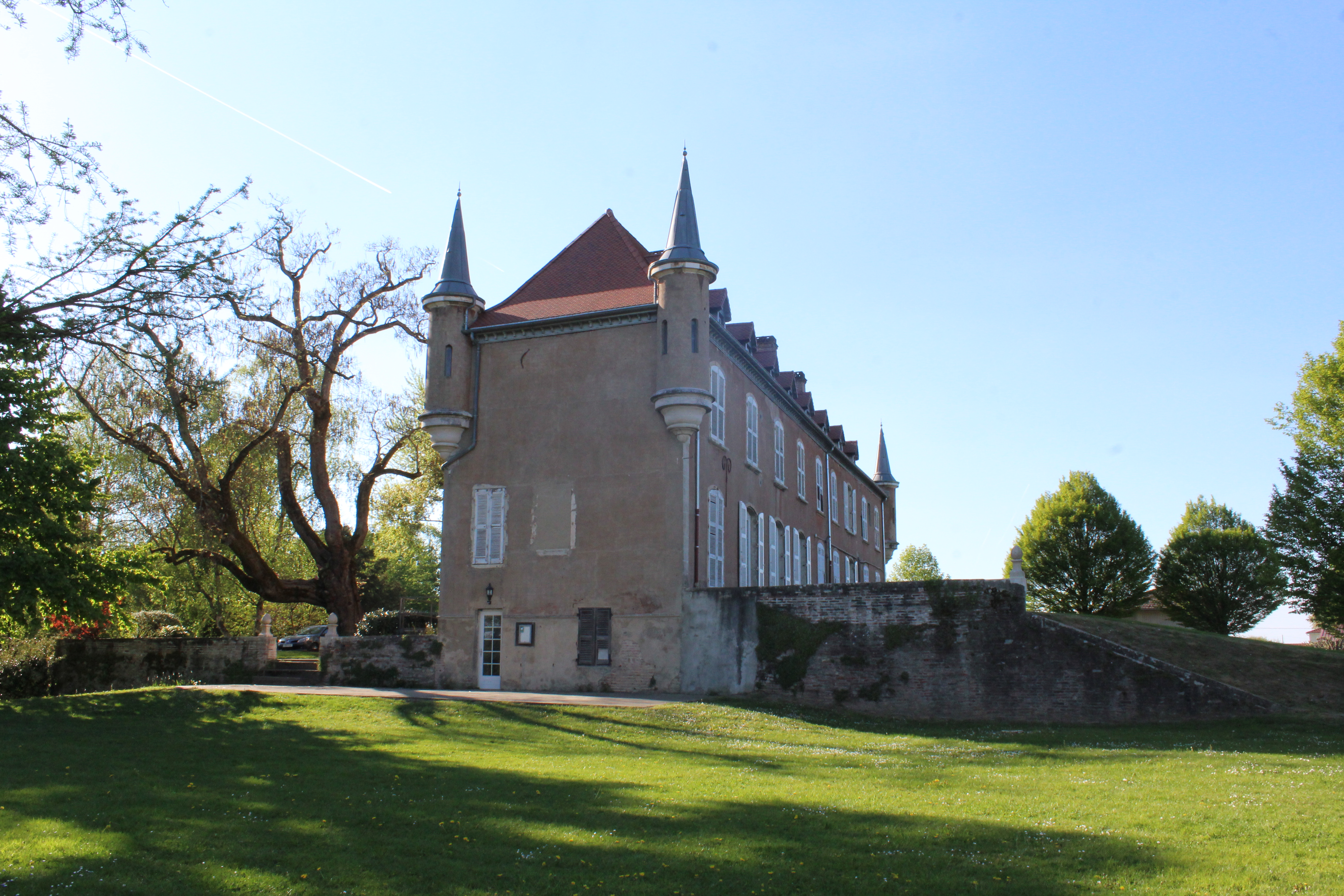 Château de Salvert, Attignat.